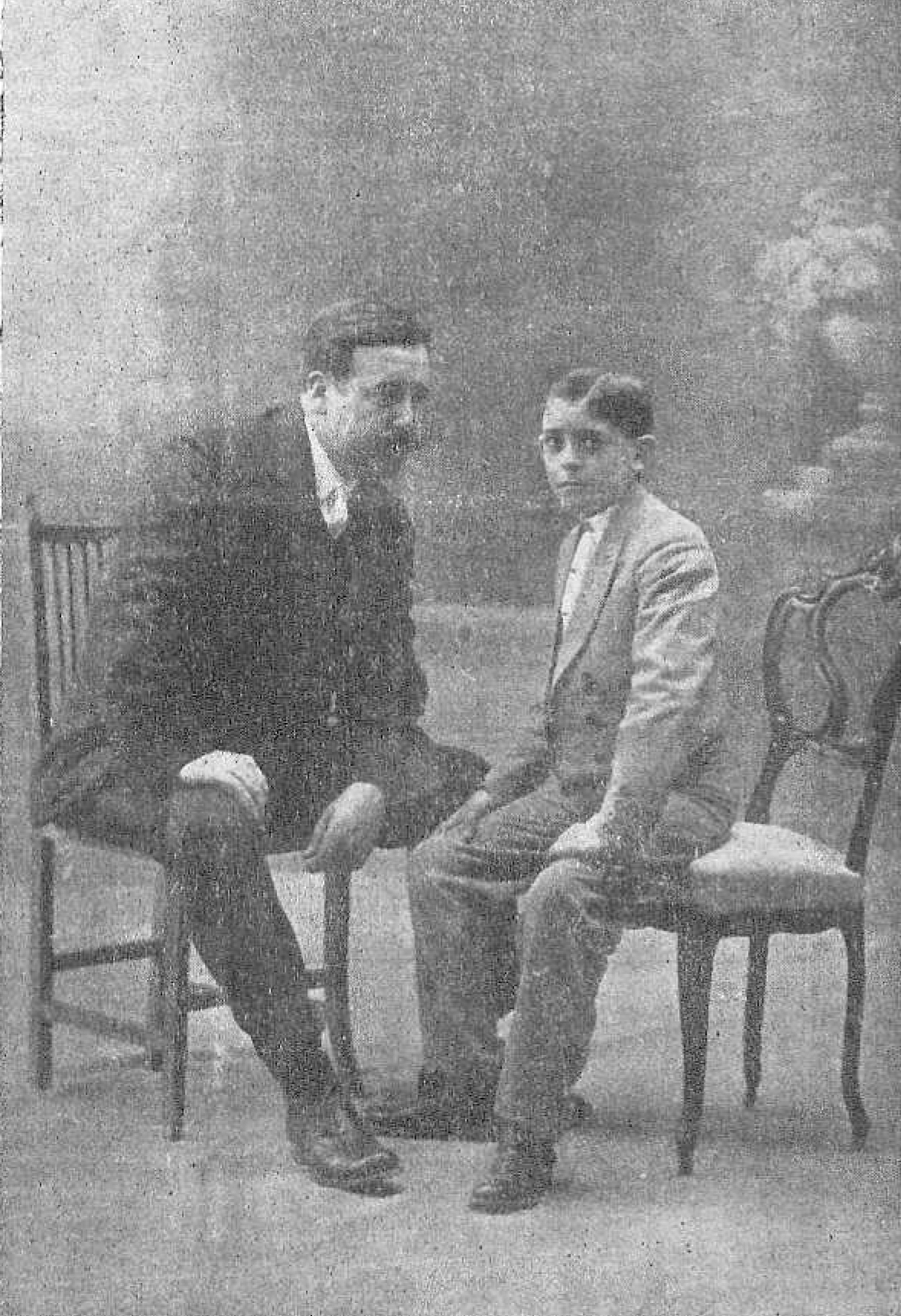 Imagen del torero Marcial Lalanda de niño, en 1915